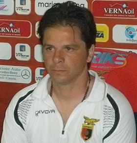 Nicola Romaniello in maglia Casertana 2015